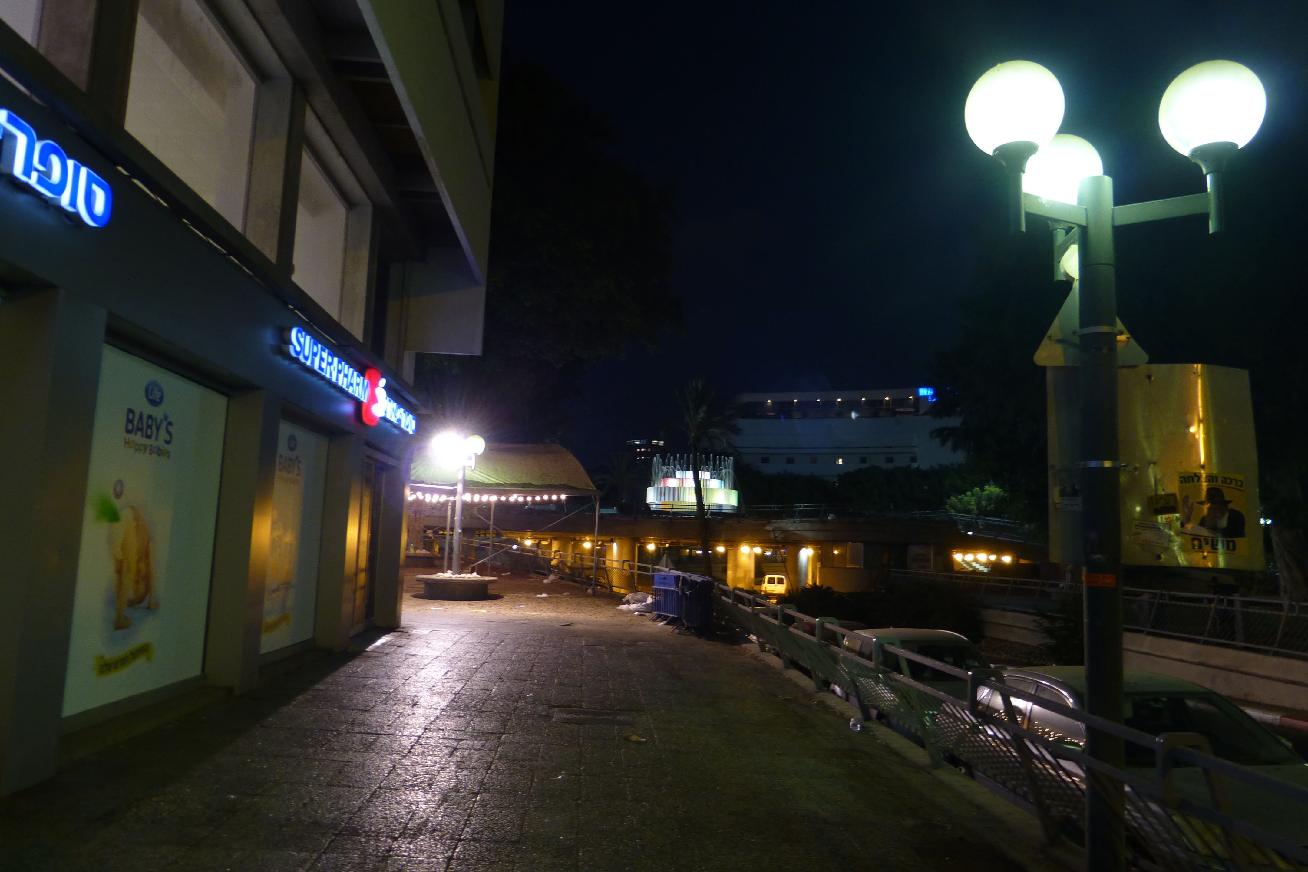 כיכר צינה דיזנגוף קרויה על שם צינה דיזנגוף, רעייתו של ראש העיר הראשון, מאיר דיזנגוף. הכיכר נחשבה במשך שנים רבות כאחד מסמליה של תל אביב. הכיכר הייתה חלק מתוכנית גדס, תוכנית מתאר לעיר תל אביב שהכין פטריק גדס, מתכנן ערים סקוטי. עיצוב הכיכר נעשה על ידי האדריכלית ג'ניה אוורבוך, שזכתה בתחרות העיצוב של הכיכר בשנת 1934. התכנון היה על פי קריטריונים של הסגנון הבינלאומי, שהיה הסגנון האדריכלי המרכזי בתל אביב בתקופה זו.